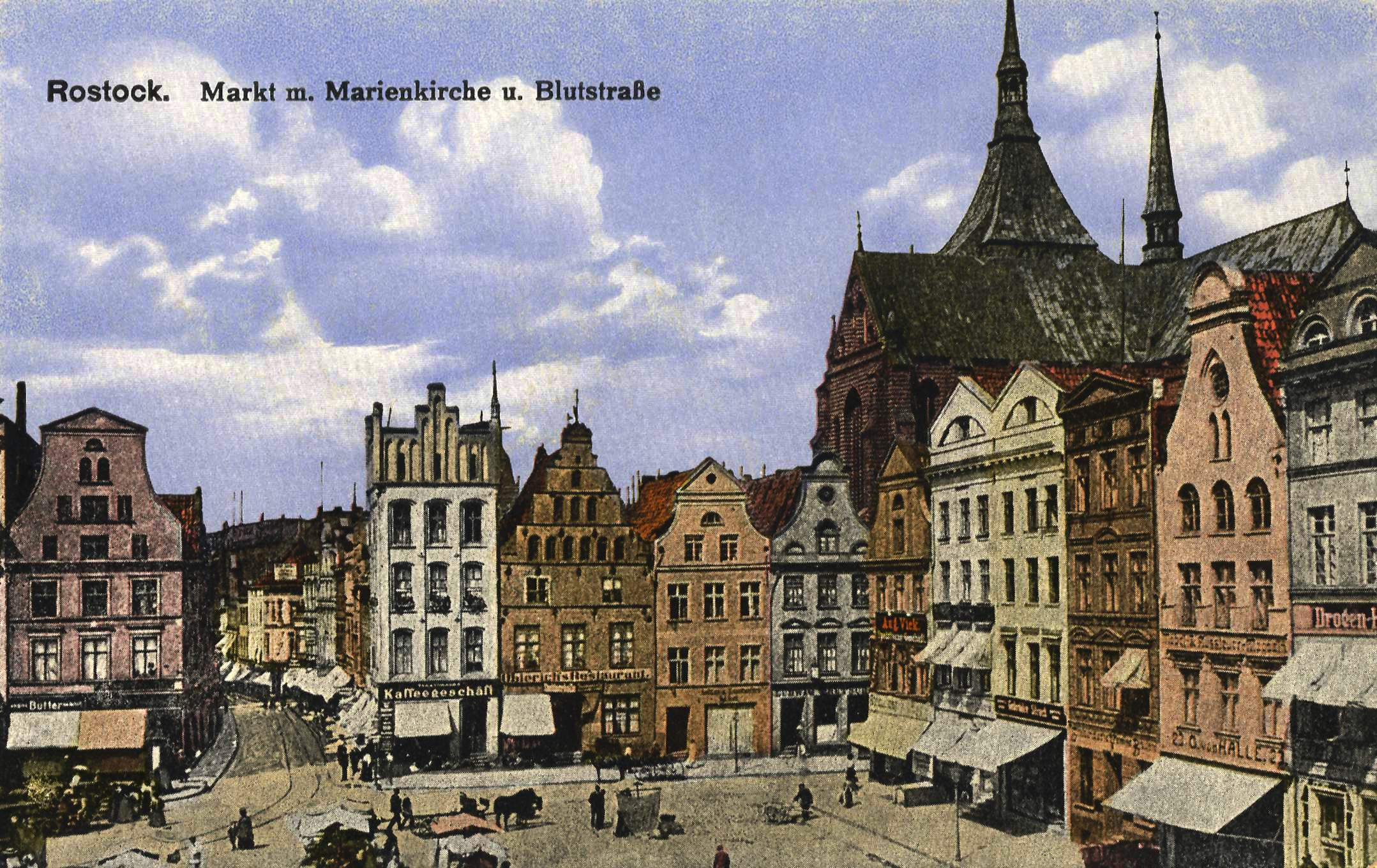 Neuer Markt und Blutstraße (heute Teil der Kröpeliner Straße) in Rostock. Im Hintergrund St. Marien. Rechts die Häuserzeile der Marktplatz-Nordseite, die nach dem Krieg trotz geringer Beschädigung abgerissen wurde.